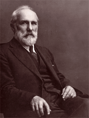 Ярнефельт Арвид финский писатель